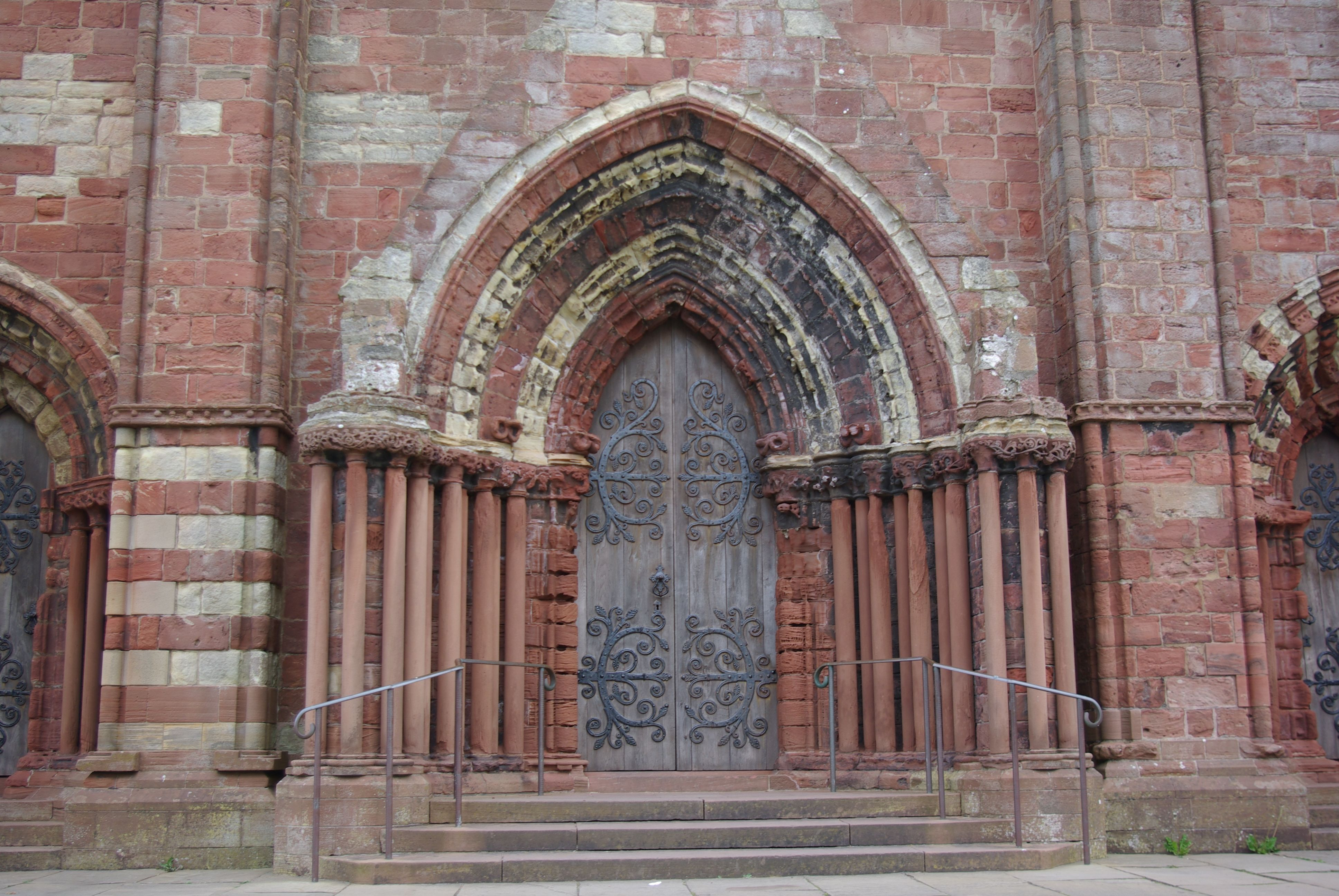 Kirkwall, Orkney, Schottland. Das Hauptportal der Kathedrale St. Magnus an der Ostseite.